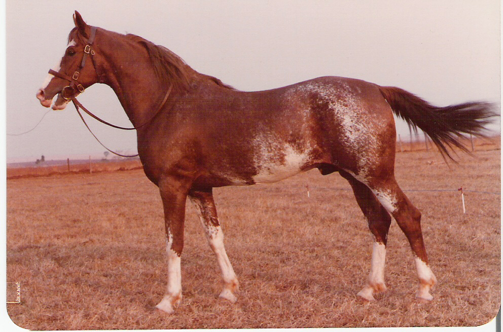 Colorado RN, Mangalarga Paulista. Possui sangue de todos os troncos formadores do mangalarga moderno. Fortuna,Joia, Telegrama, Gregório,Rosilho ou Abismo e sublime. Possui também sangue estrangeiro pelas éguas Porcelana,colina I e chata. Apesar deste sangue estrangeiro, em sua quinta geração, era um animal de extrema comodidade na marcha trotada e flexibilidade ao galope.Este mesmo sangue estrangeiro encontra-se presente também em Marimbo M através da égua Colina I, cavalo muito usado no Mangalarga Marchador. Foto tirada na fazenda Santa Rita. Colorado possesss blood of all the male lines of the modern mangalarga. Fortuna, Joia da Chamusca, Telegrama, Gregorio, Rosilho or Abismo and Sublime. Colorado also possesss foreign blood for the mares Porcelana, Colina I and Chata. Although this foreign blood, in its fifth or more distant generation, was an animal of extreme comfort when marching and flexibility to the gallop. Photo taken off in the Santa Rita farm-Morro Agudo,Brazil.